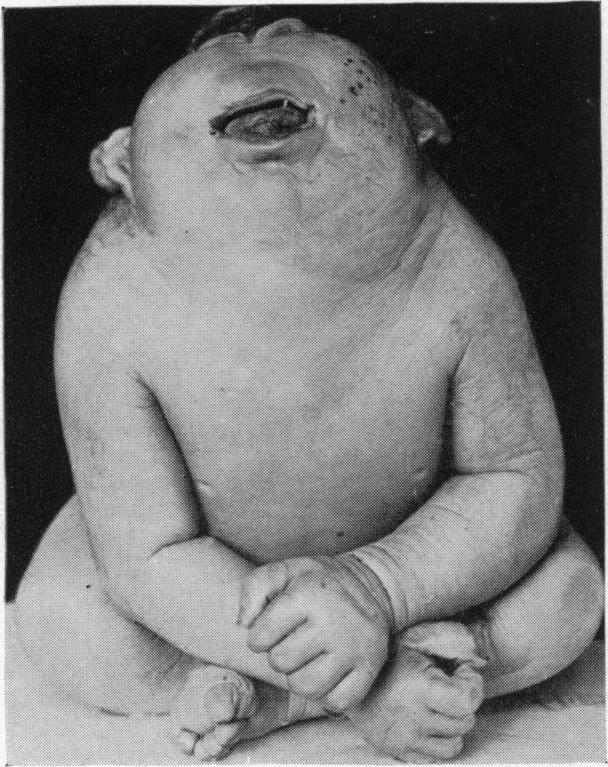 cyclops